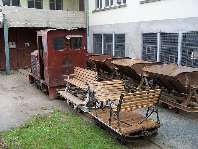 Feldbahn Blankenberg, Sammlung Feldbahn Blankenberg